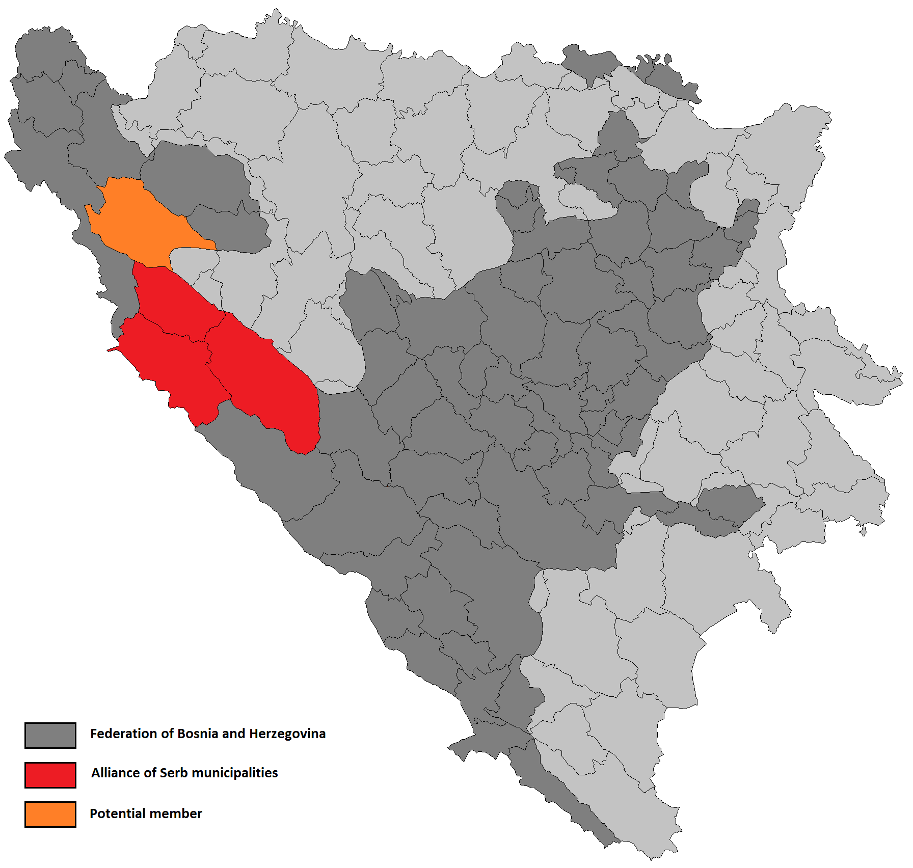 Савез српских општина 2013. године